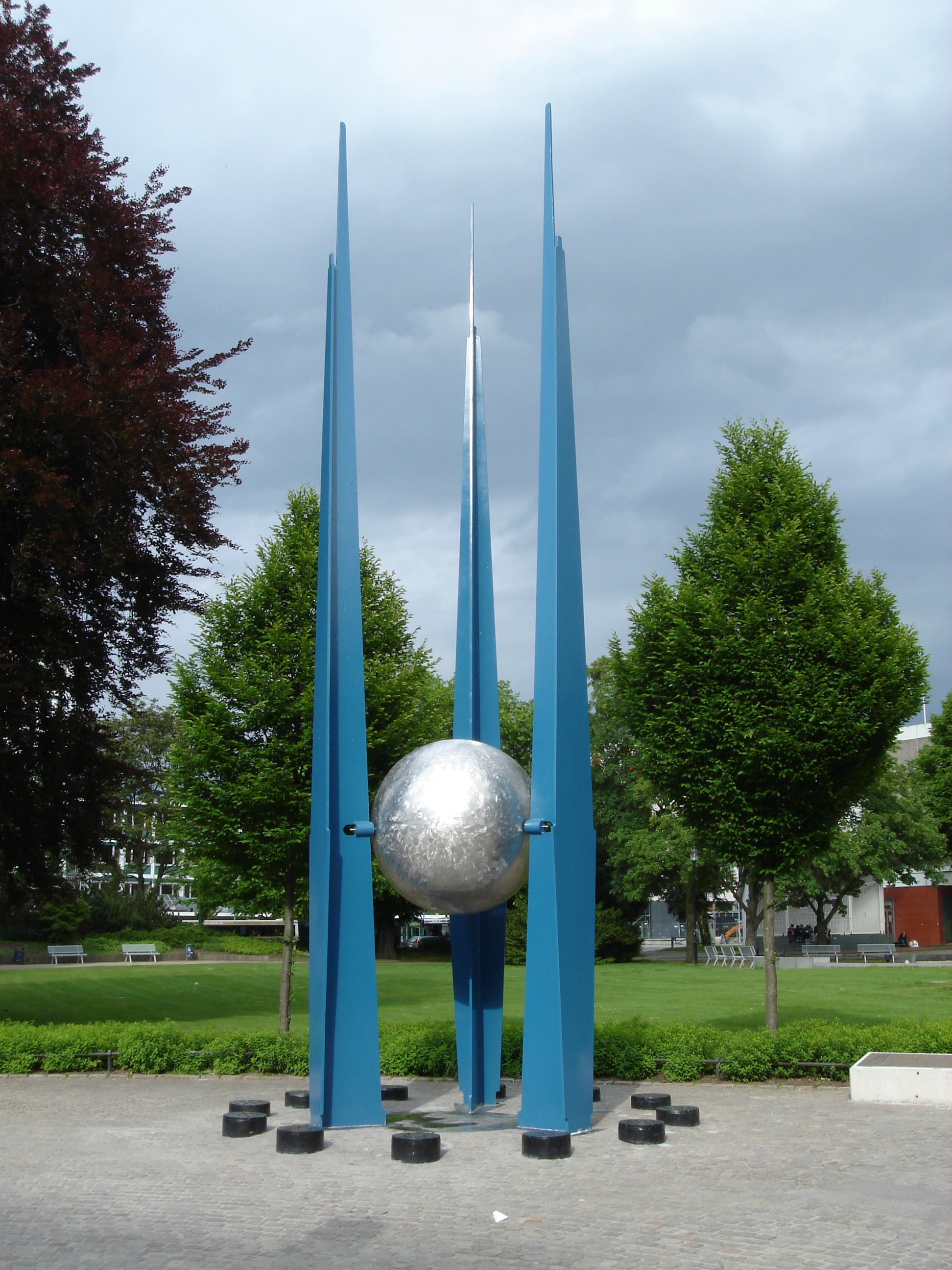 Planetenmodell Hagen, Astro-Zentrum im Volkspark